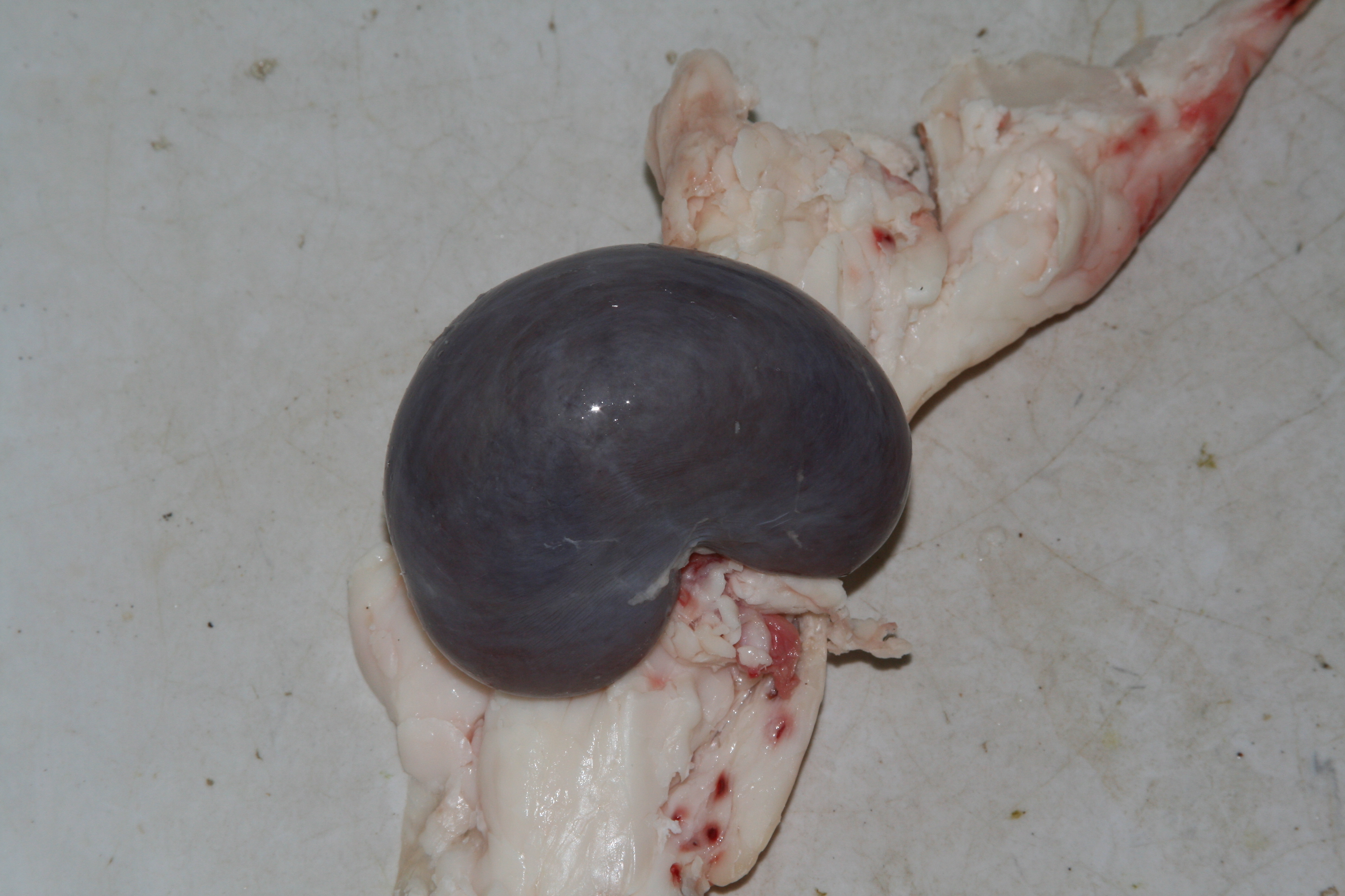 Rognon rouge (rein) d'agneau